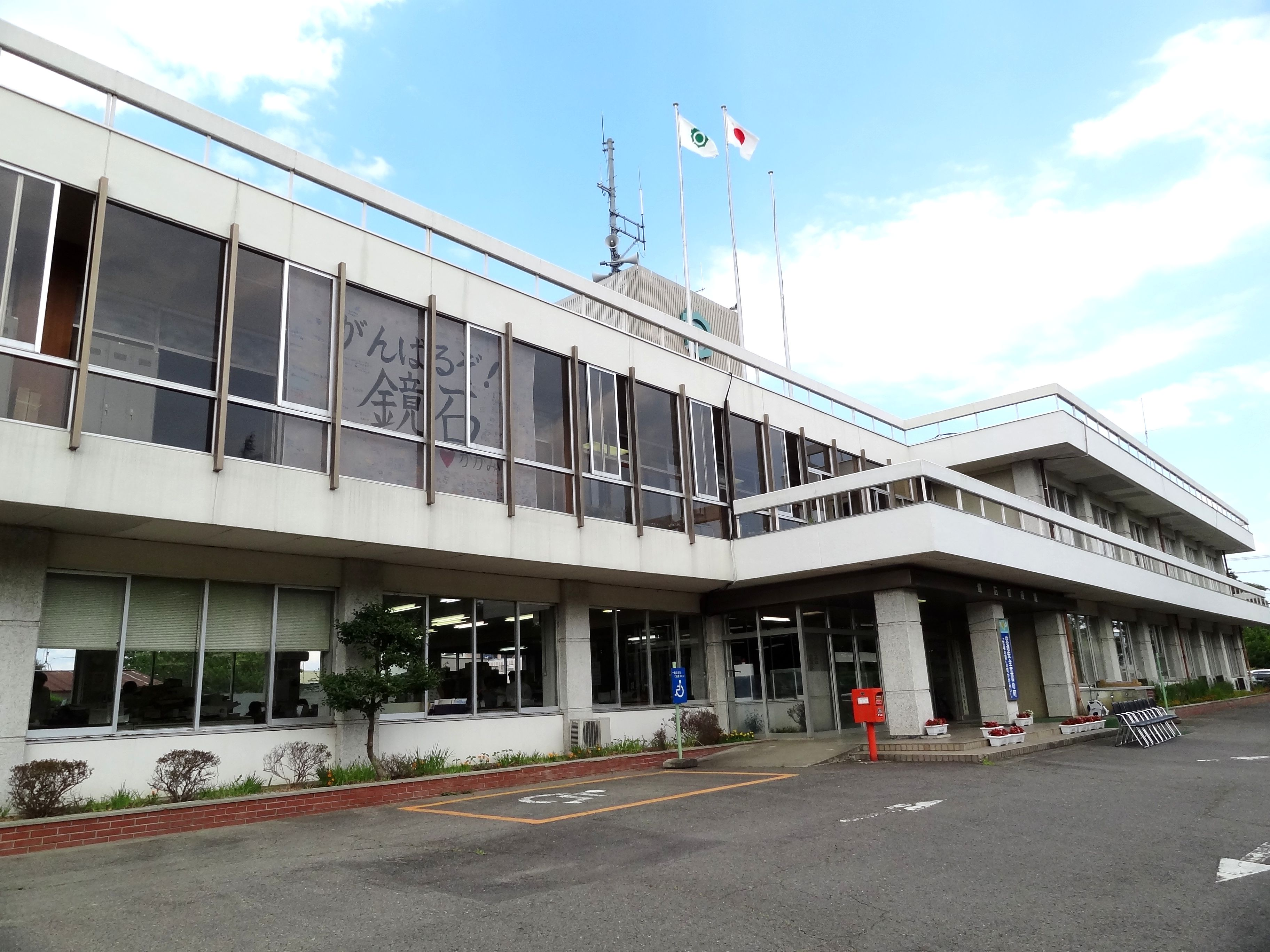 鏡石町役場